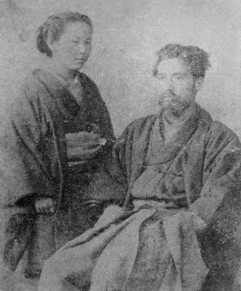 Masaru Watanabe (Japanese, *1854, †1922) and Kane Watanabe (Japanese, *1859, †1945)